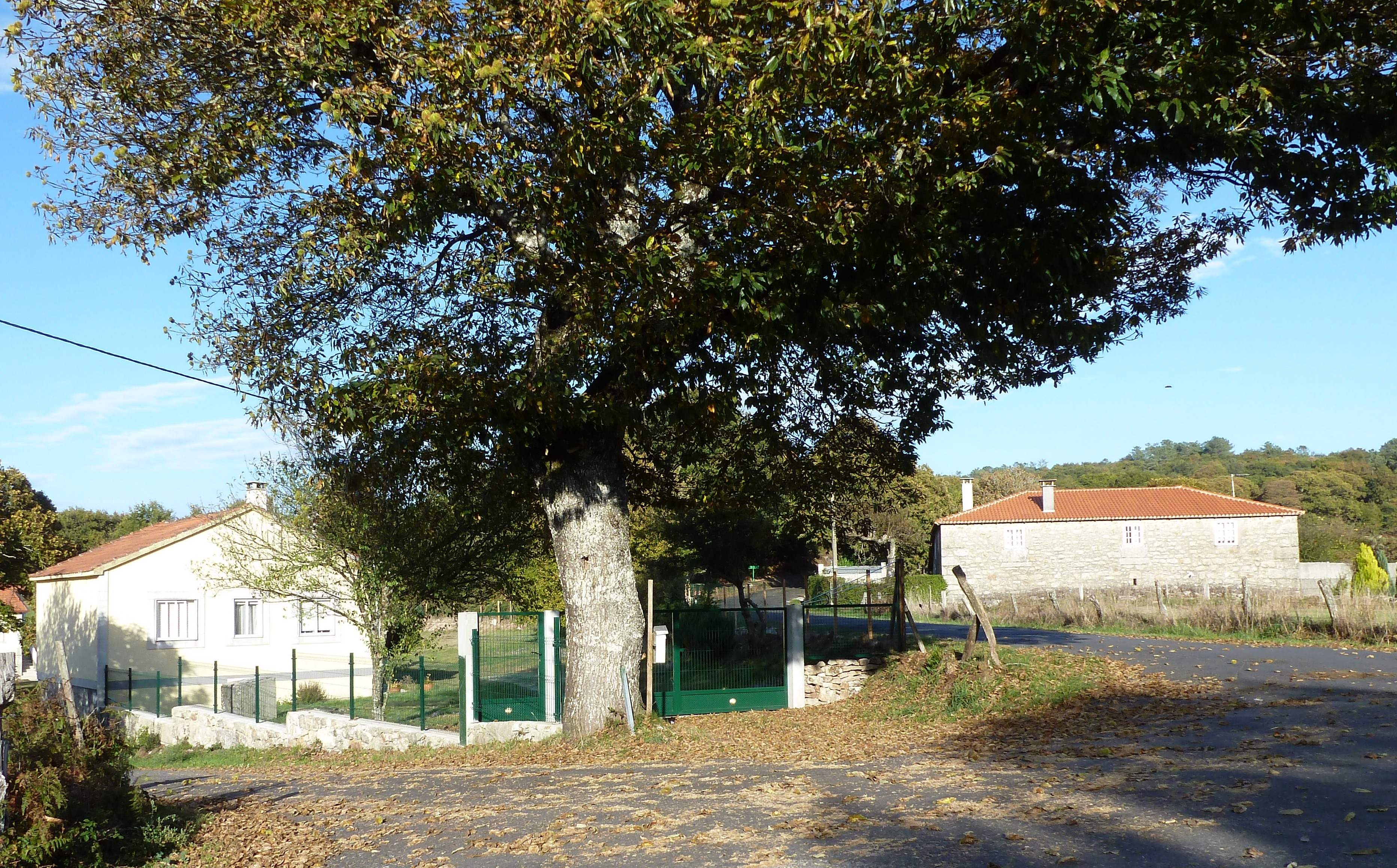 O Pereiro, Santa Mariña, Carballedo